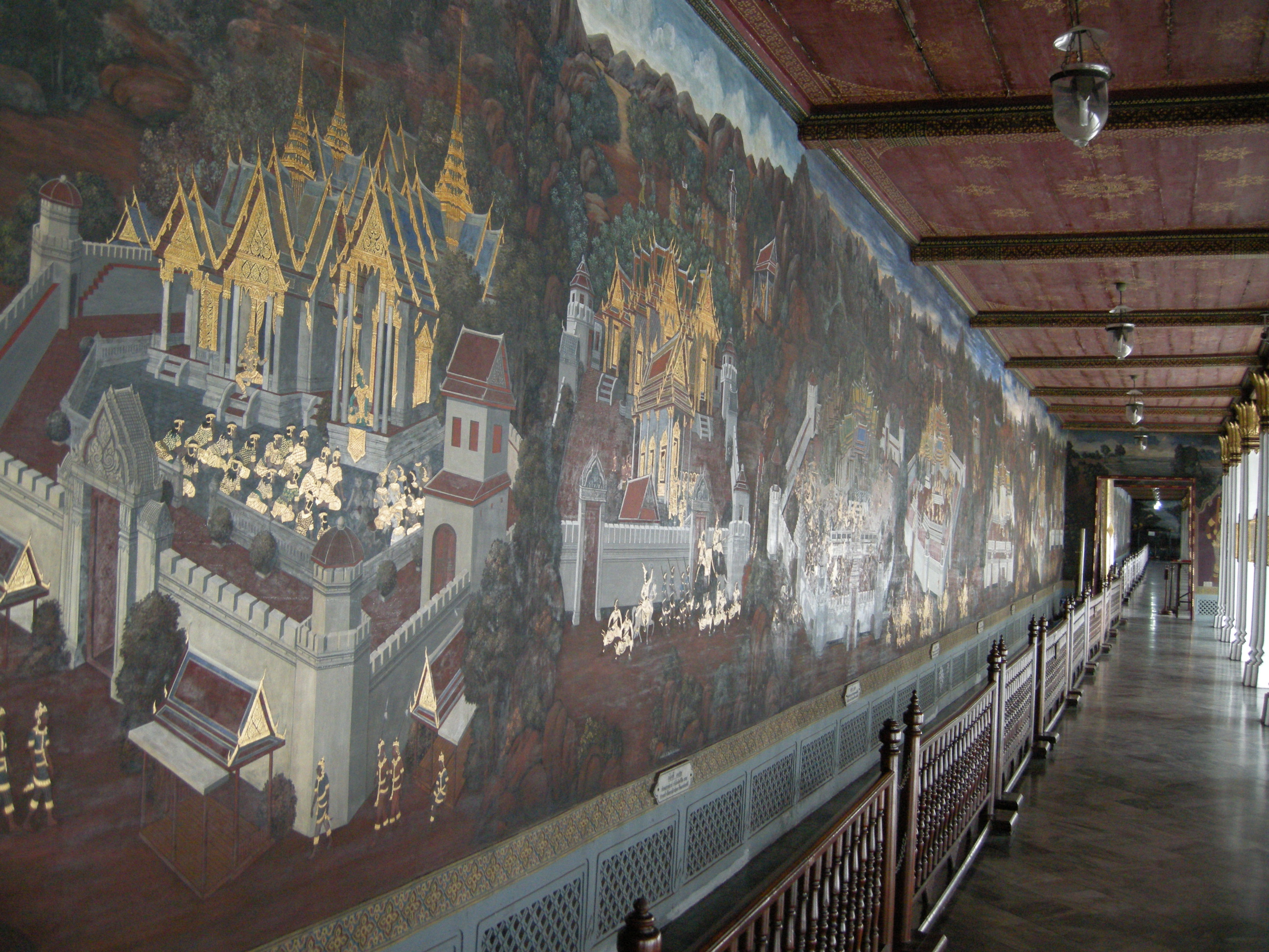 泰國版本羅摩耶那史詩（รามายณะ，Ramayana）與拉瑪堅神話（รามเกียรติ์，Ramakien）場景